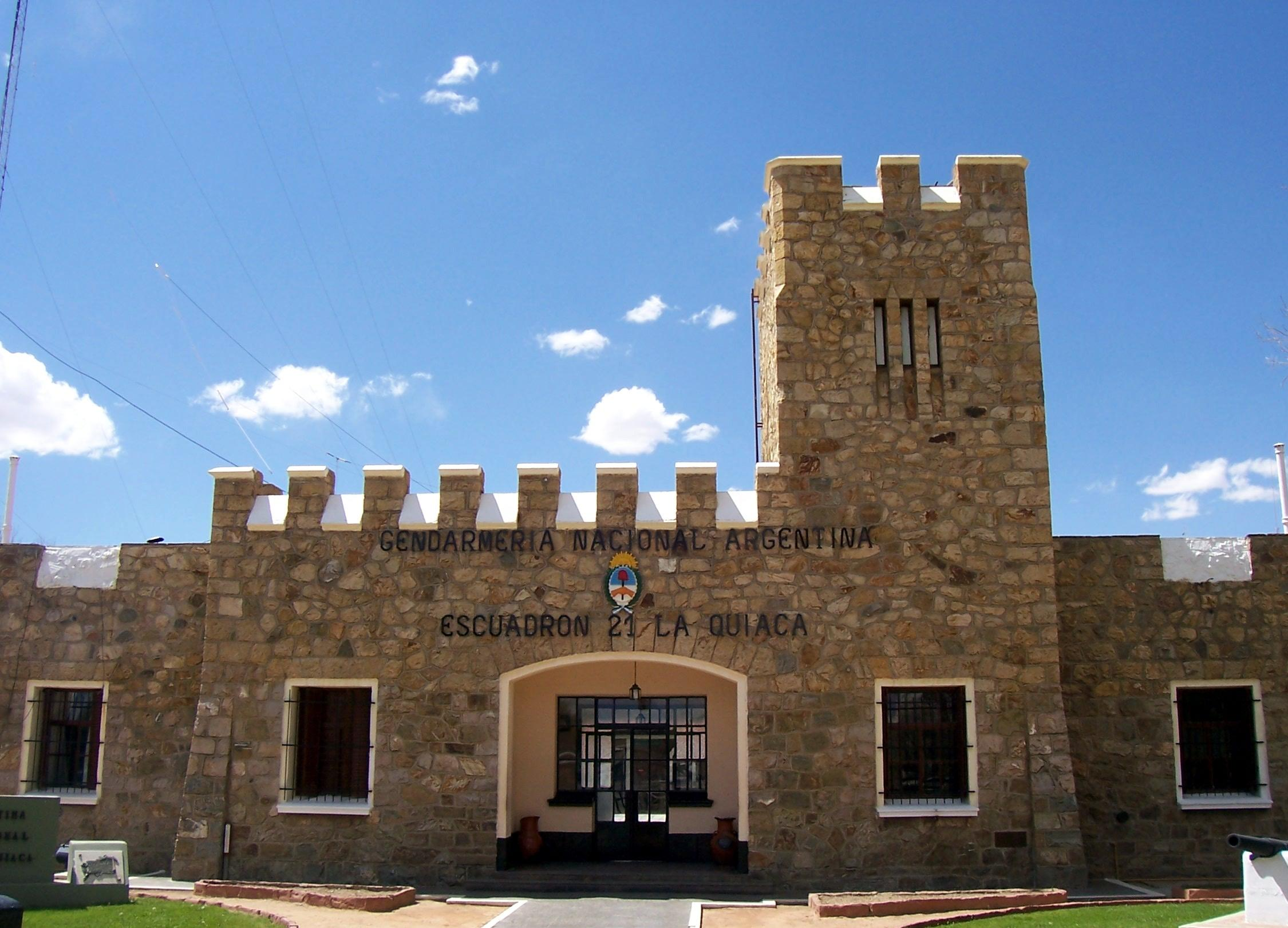 Escuadron 21 de Gendarmería Nacional. En La Quiaca, Jujuy.